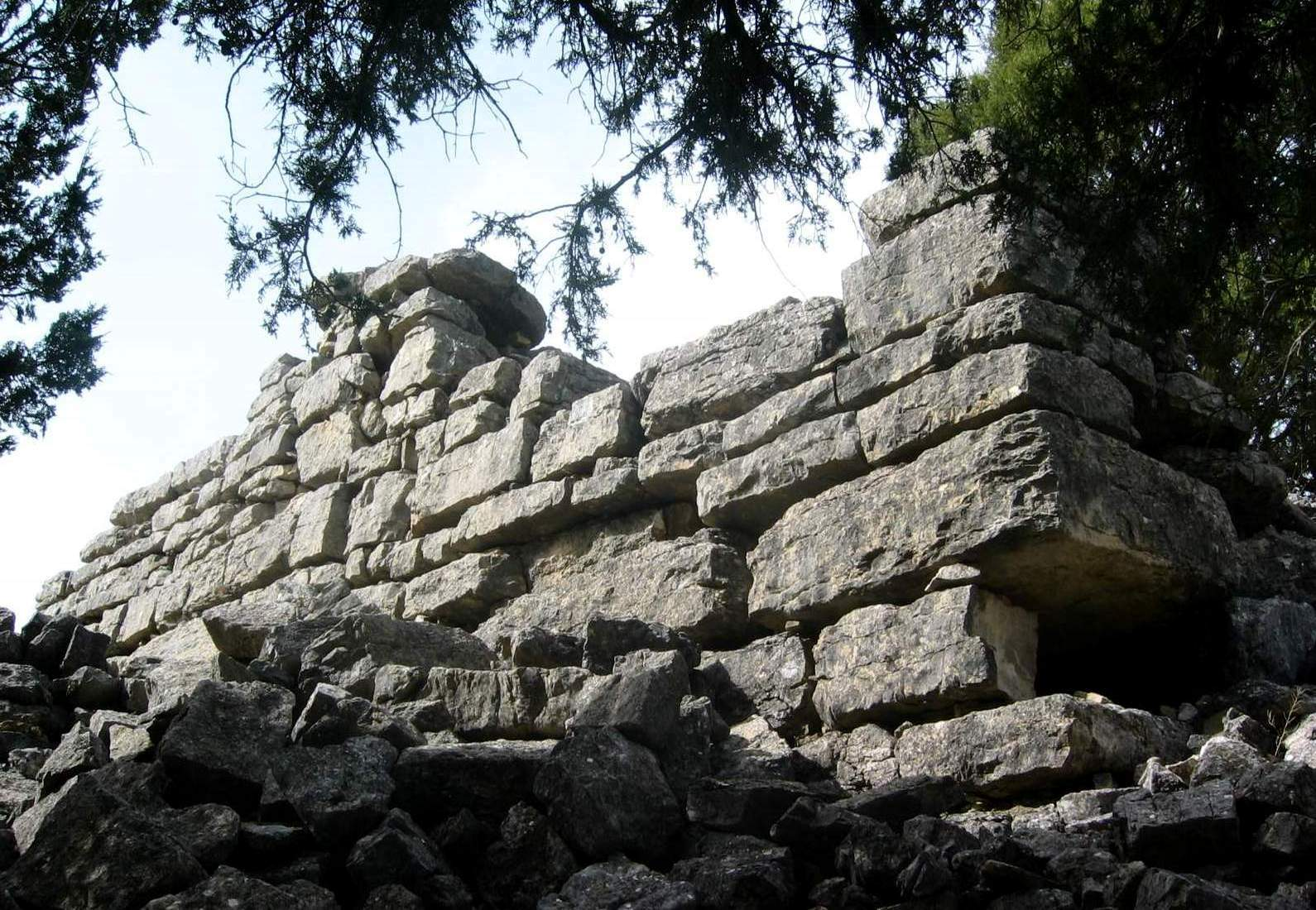 Detalle del muro oriental del mal llamado Castillo de los Moros en Sesga-Ademuz (Valencia), 2006.